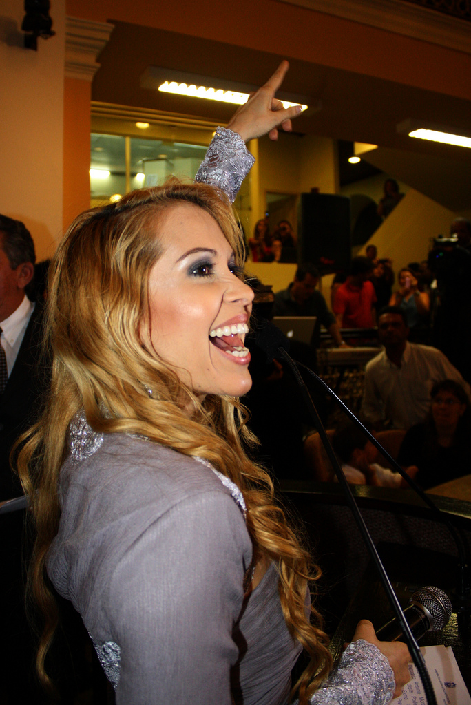 Joelma na Assembléia Legislativa de Pernambuco em 2009.